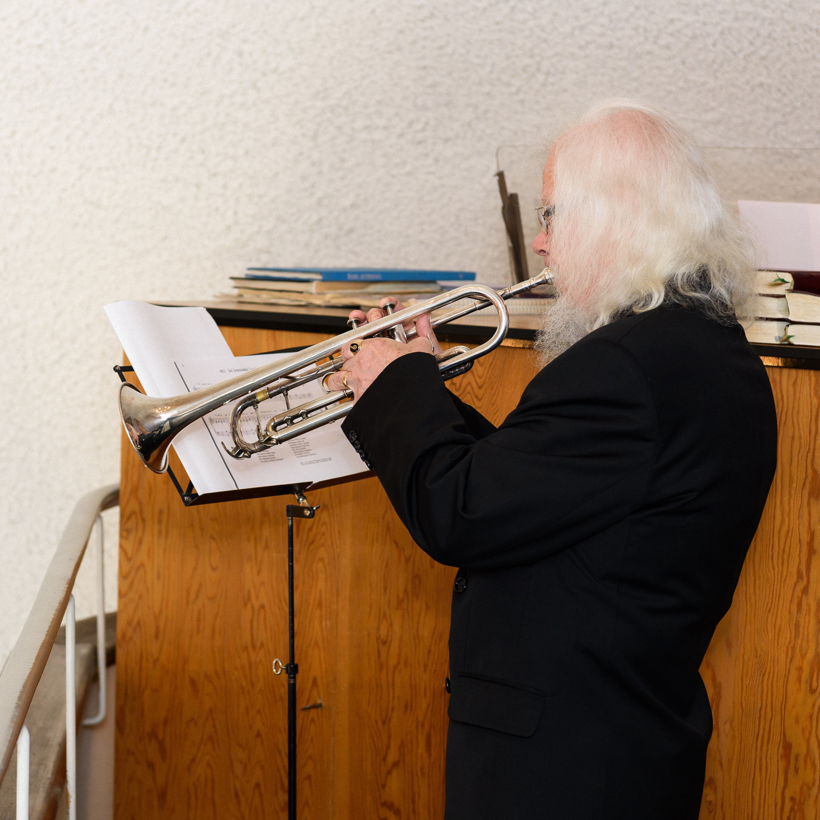 Hannu Sopanen Lappeenrannassa 28.3.2015